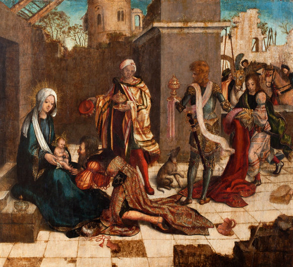 Adoração dos Reis Magos por um seguidor de Vasco Fernandes da Igreja de São Miguel de Freixo de Espada à Cinta.